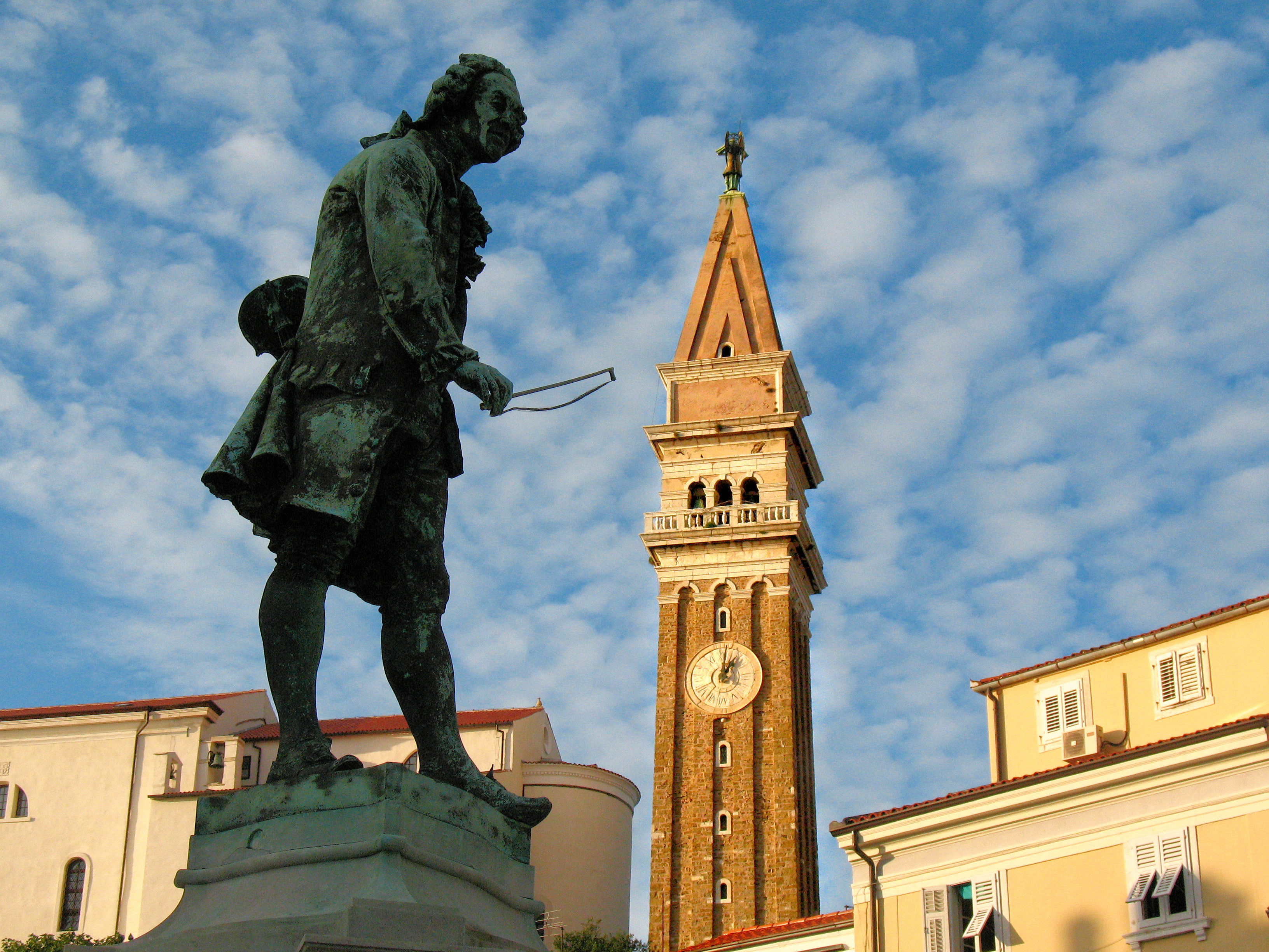 Piran, Tartini-Platz mit Tartinistatue des Antonio Dal Zotto; im Hintergrund die Sankt Georgs Kathetrale (Sv. Jurij)